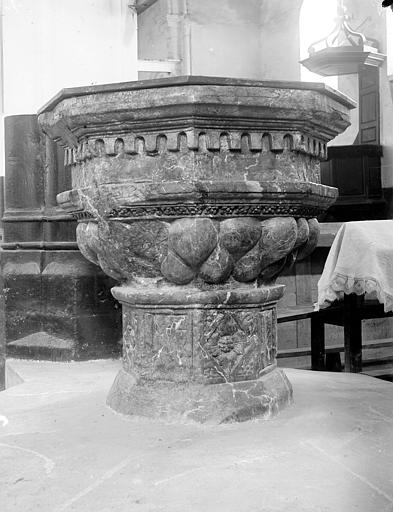 Église Saint-Martin de Lierville Félix Martin-Sabon fond baptismal